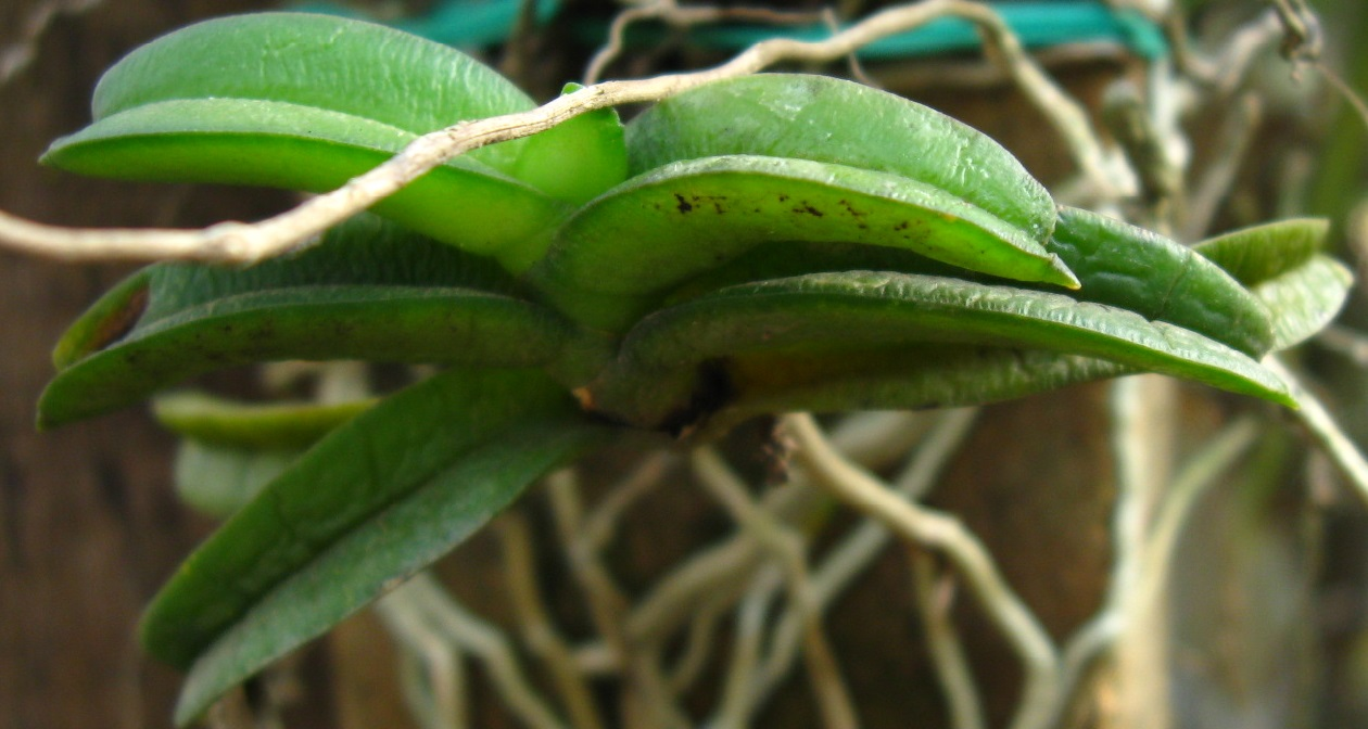 Feuilles grasses à texture coriace